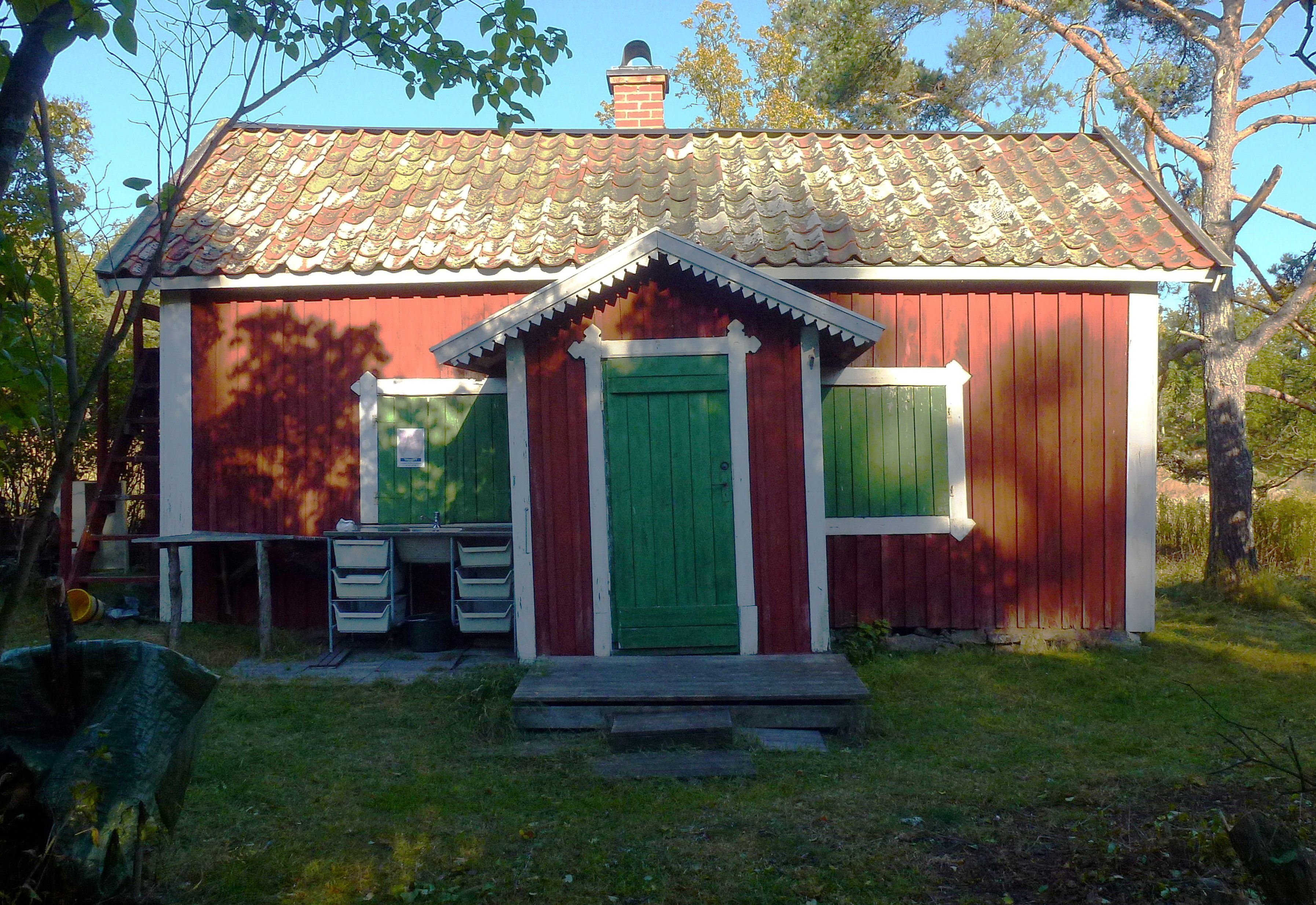 Torpet Sanda, tillhör Erstavik